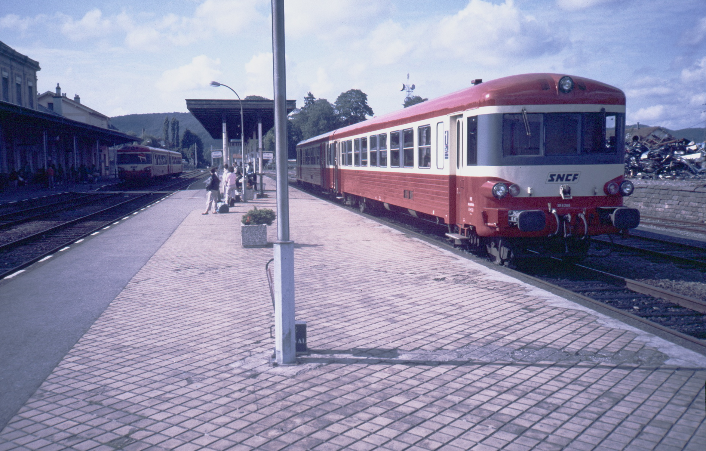 SNCF-Baureihe X 4300 im Bahnhof Remiremont